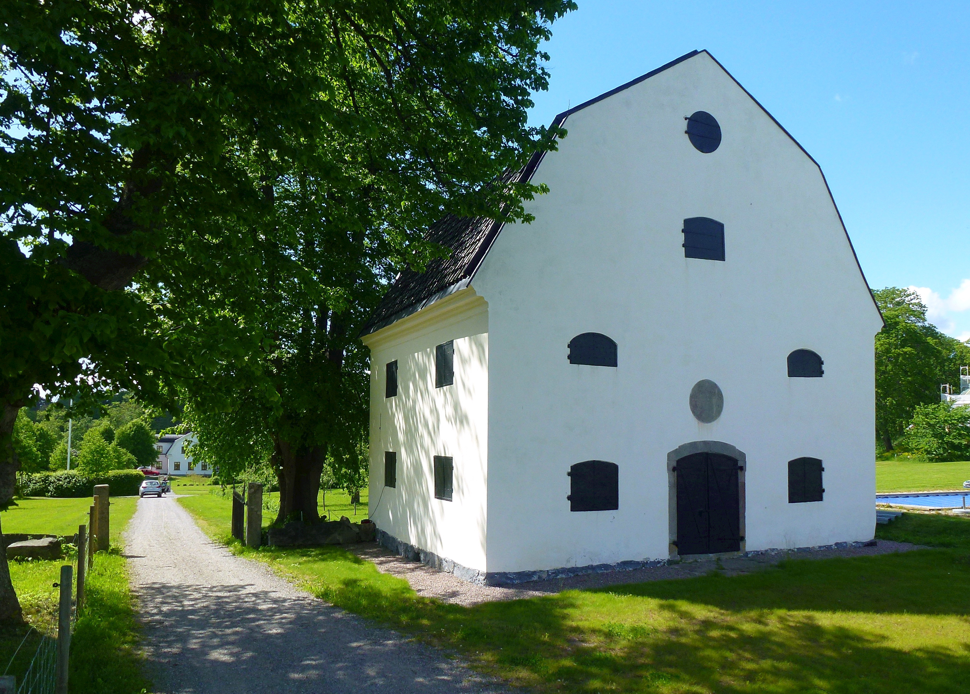 Torsåkers magasinsbyggnad